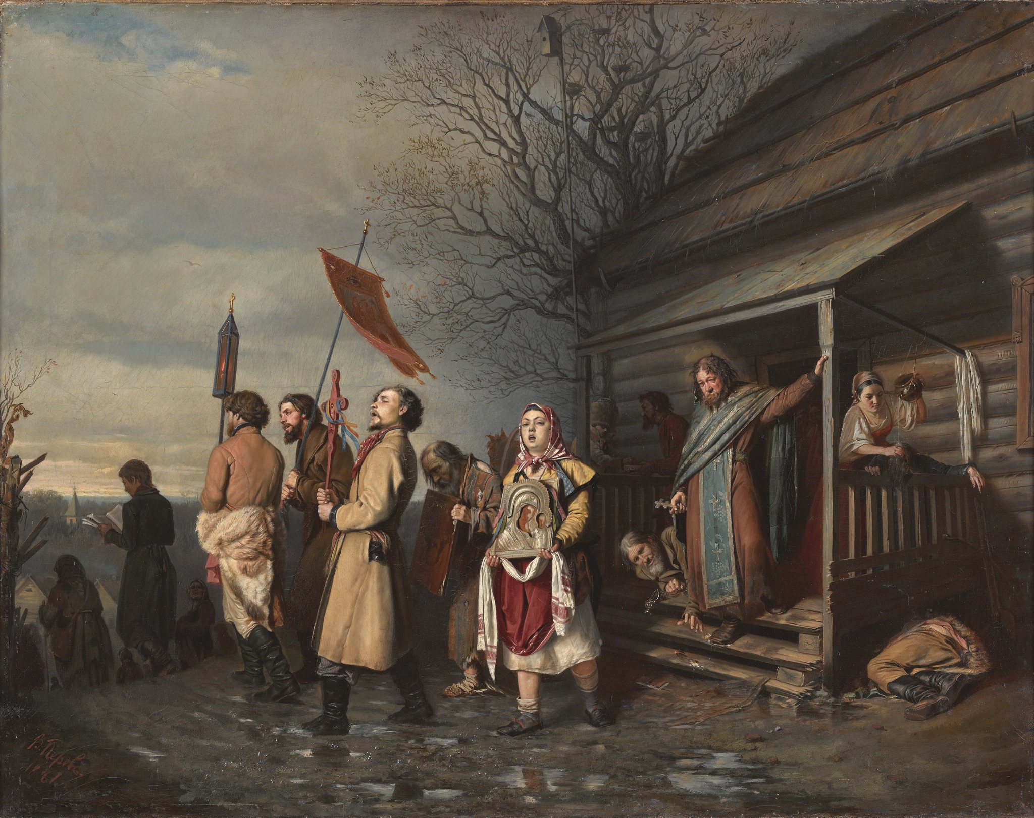 В. Г. Перов. Сельский крестный ход на Пасхе. 1861. Холст, масло. 71,5 × 89 см. Инв. 359. Третьяковская галерея, Москва, Россия. «Правильно это действо называется не «крестный ход», а «хождение с крестом». В чём здесь суть? У священника была прямая обязанность поздравлять всех проживавших в границах его прихода православных христиан с Пасхой и Рождеством, посетив их дома со Святым Крестом и иконами. Дело в том, что во время хождения с крестом по домам хозяин не только угощал церковников вином, но давал положенную десятину деньгами и плодами своих трудов. Церковнослужители, особенно низшего ранга, кормились этим, часто небогатым, подаянием в течение всего года. Сами священники тоже были заинтересованы в этих посещениях. Кроме получения денег и других пожертвований, они тем самым могли оказать уважение влиятельным людям, которые могли повлиять на решение крестьянского мира. А в итоге поздравление прихожан, которое действительно было обязанностью священника, было тягостным испытанием для его трезвости, учитывая, что священник обходил за один день несколько сёл и деревень. Не мудрено, что многие молодые священники с семинарским и тем более академическим образованием отказывались этим заниматься, но на них тогда поступали жалобы в консисторию и благочинному от зажиточных прихожан и даже подчинённых священнику клирошан.»— прот. Александр (Рябков), in: Грязен, неряха, груб, глуп и, наверное, пьяница… Боже мой, и это священник!